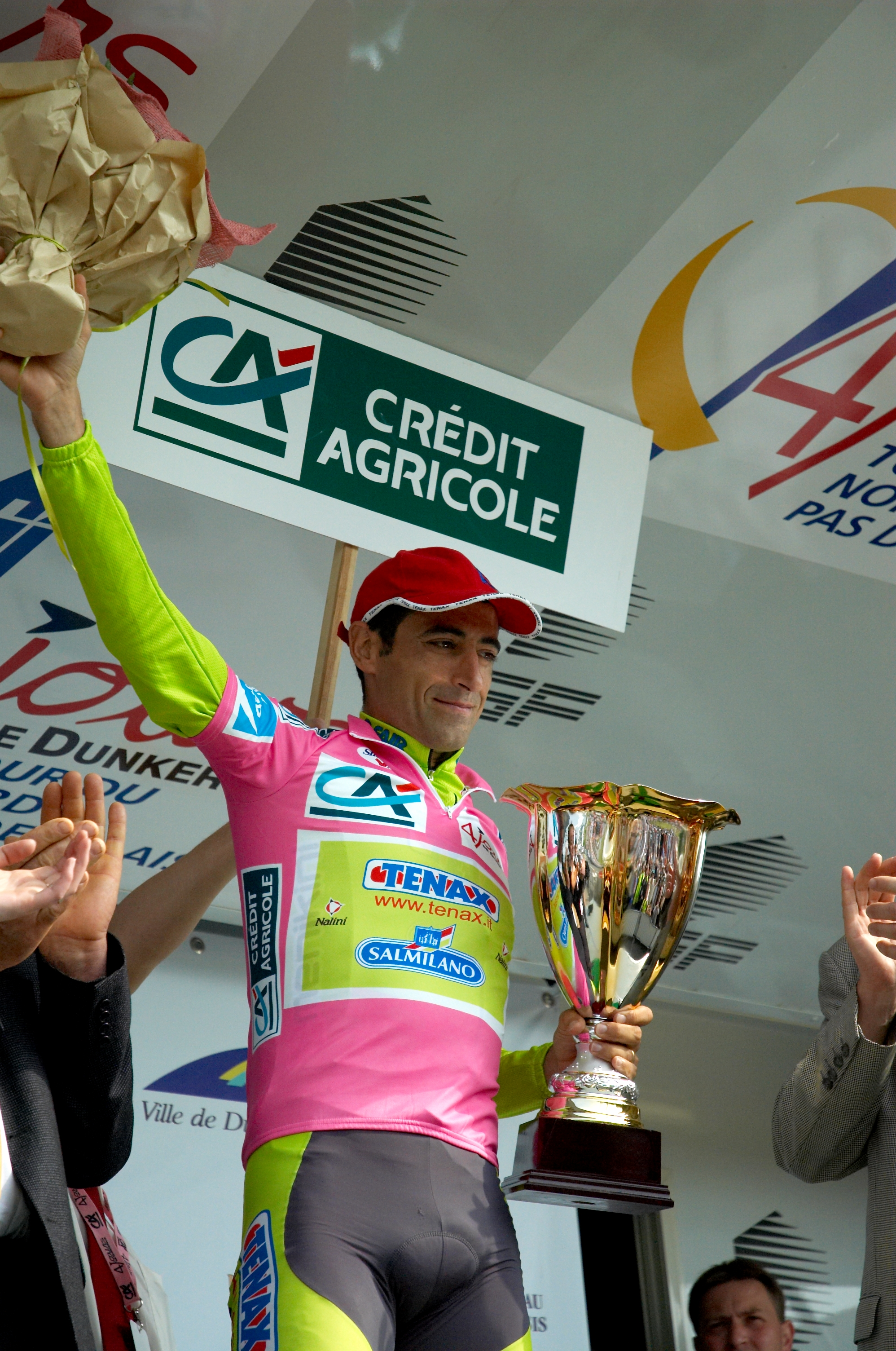 52nd Quatre Jours de Dunkerque - 2.HC - Roberto Petito